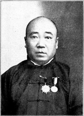 李景濂，清朝光緒末科進士，民國政治人物、參議院議員。